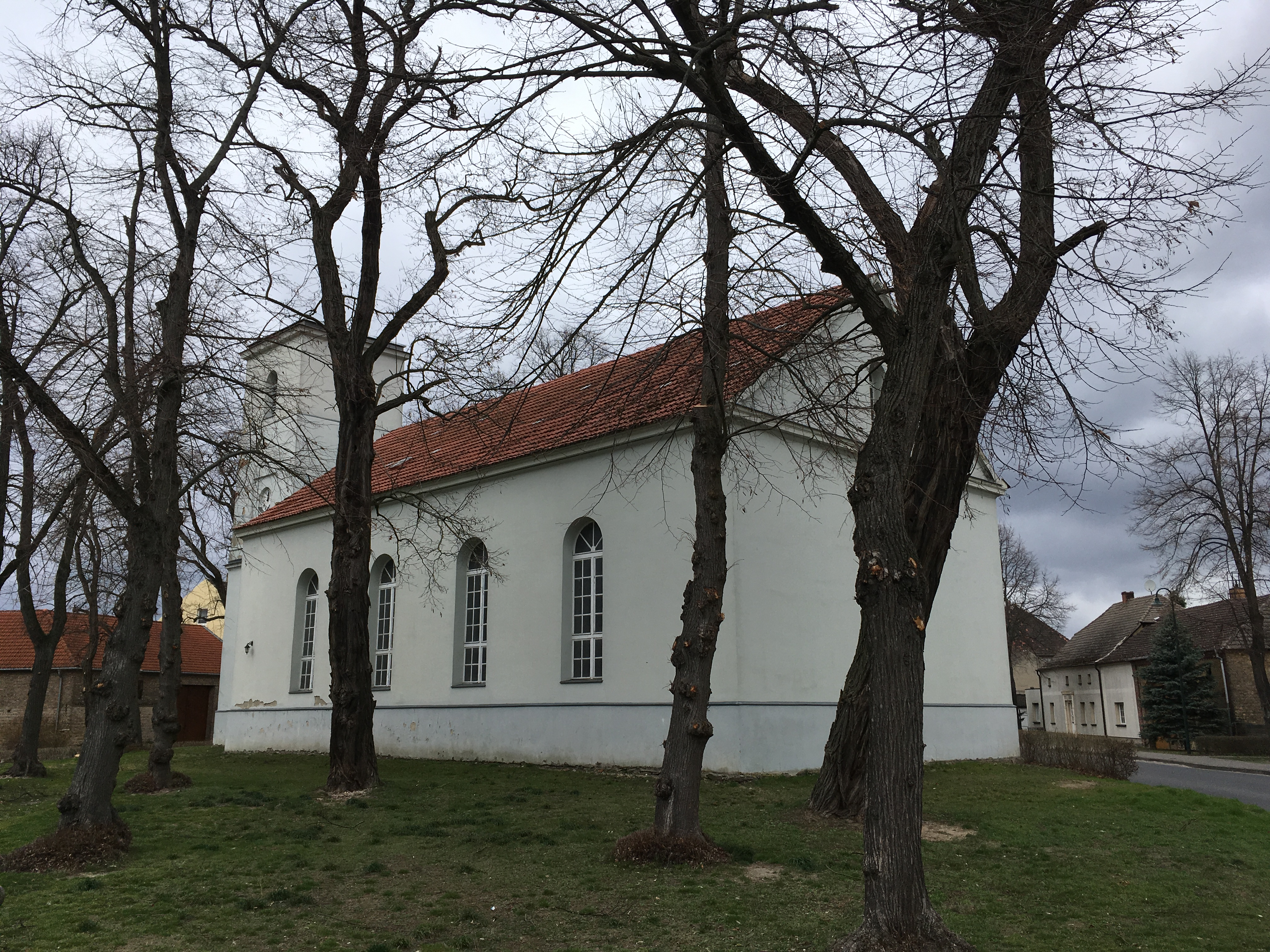 Die Dorfkirche Jänickendorf entstand in den Jahren 1833 bis 1835 im Rundbogenstil. Sie steht auf dem historischen Dorfanger in Jänickendorf, Gemeinde Nuthe-Urstromtal in Brandenburg.